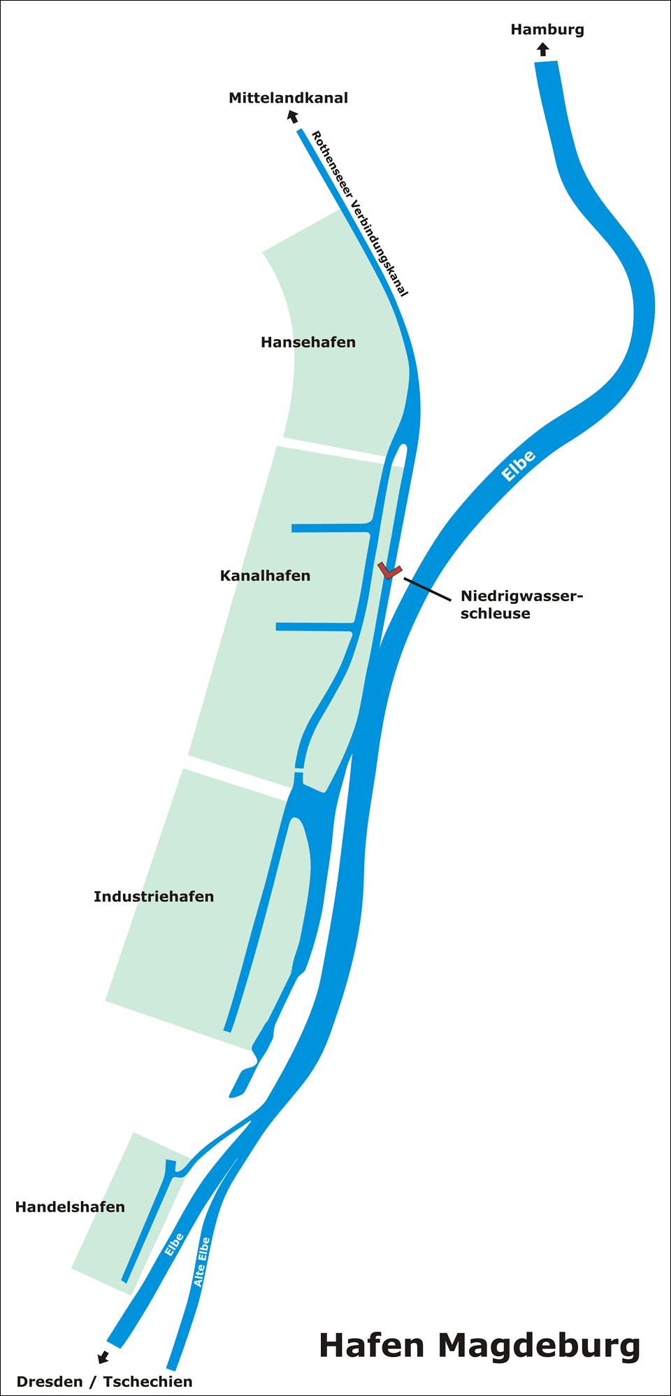 Übersicht des Magdeburger Hafens